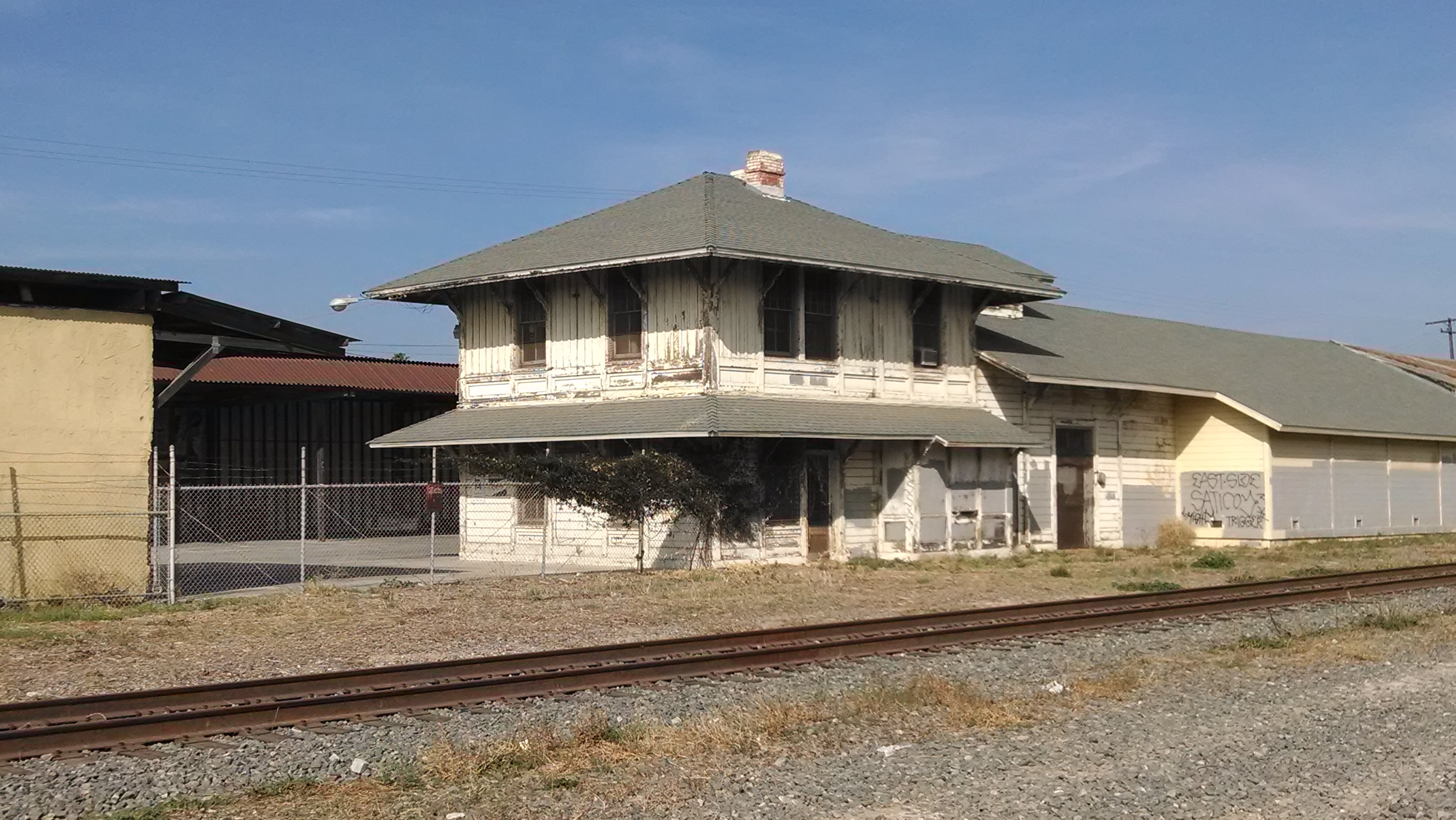 near Ventura, California